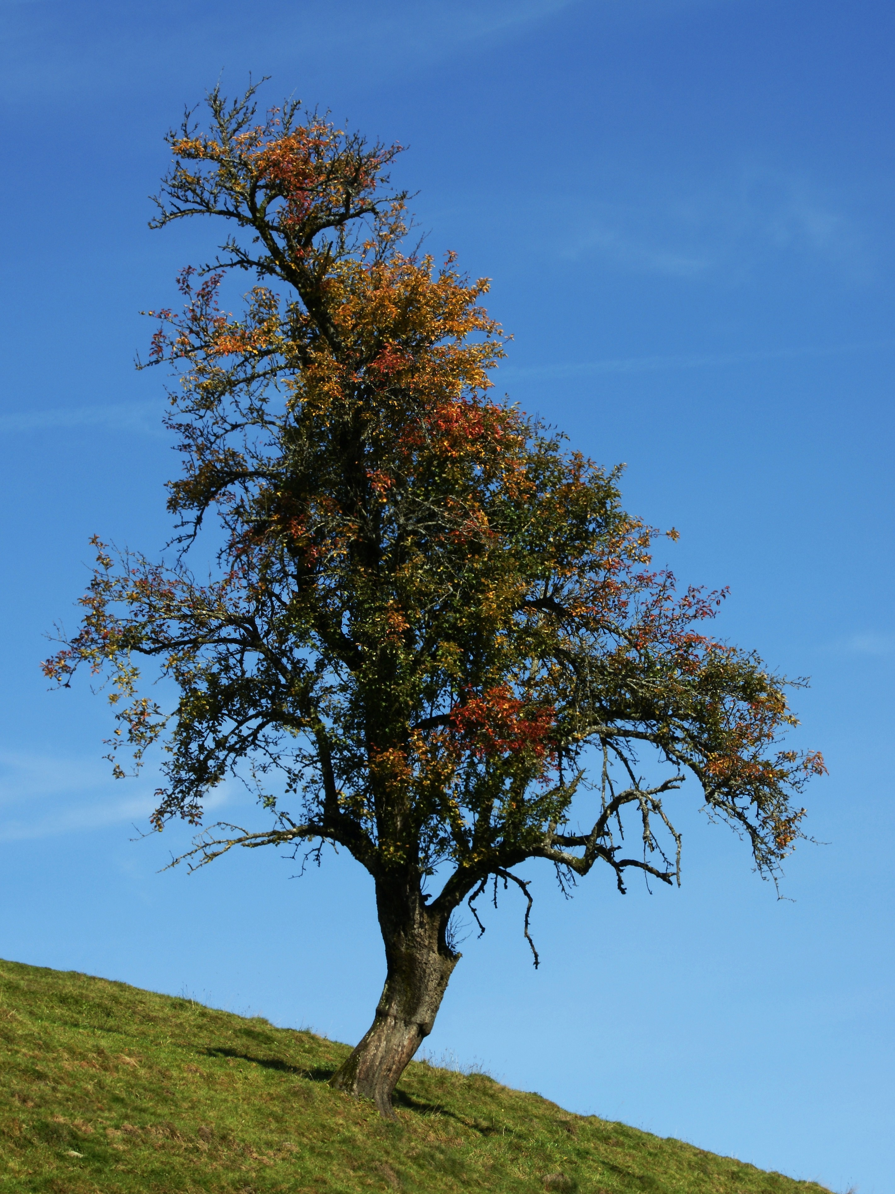 Birnbaum (Pyrus) am Gschwendele in Sulzberg.